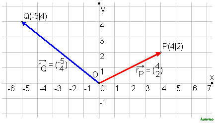 2 Punkte mit Ortsvektoren